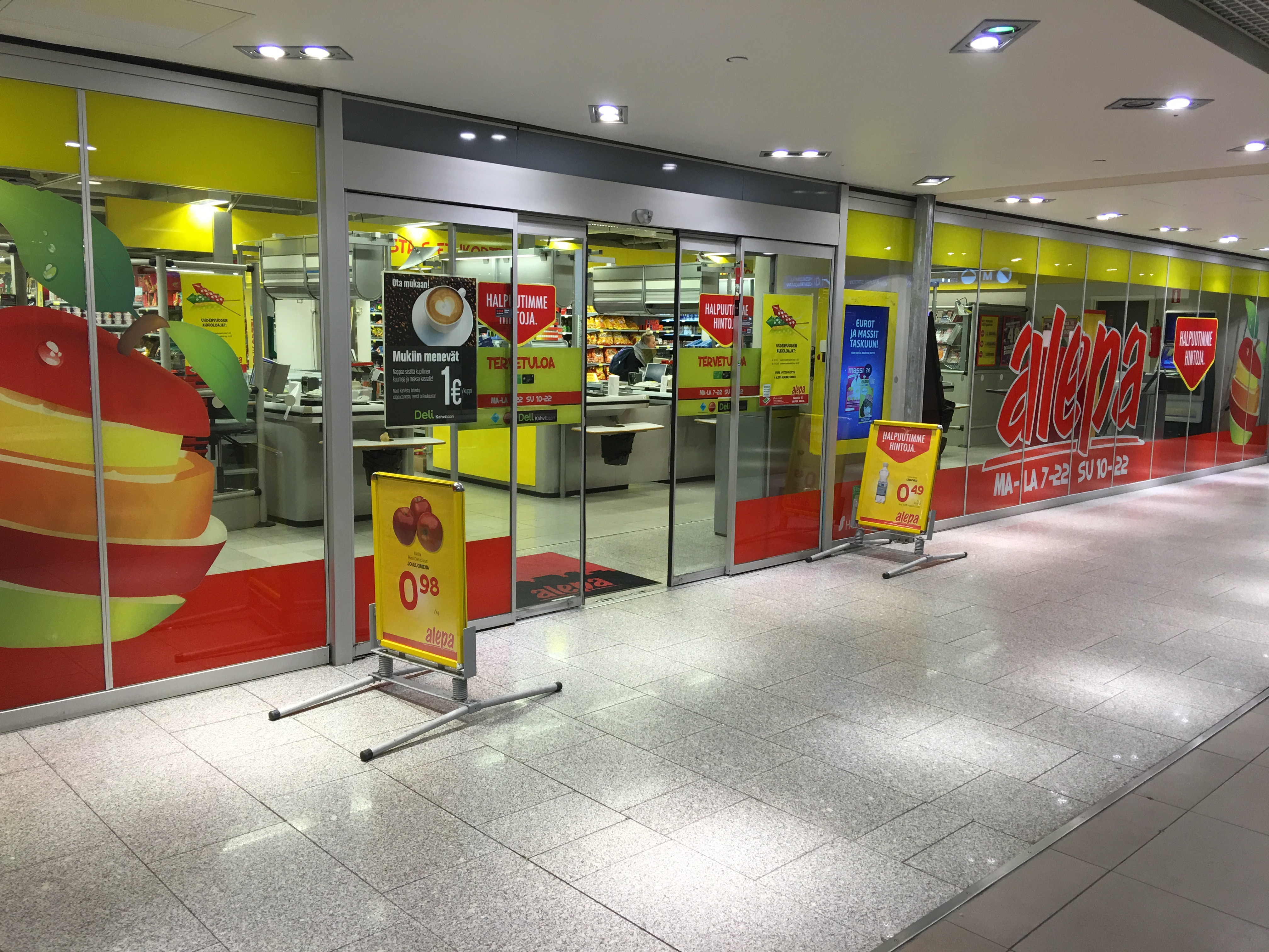 Alepa Asematunneli